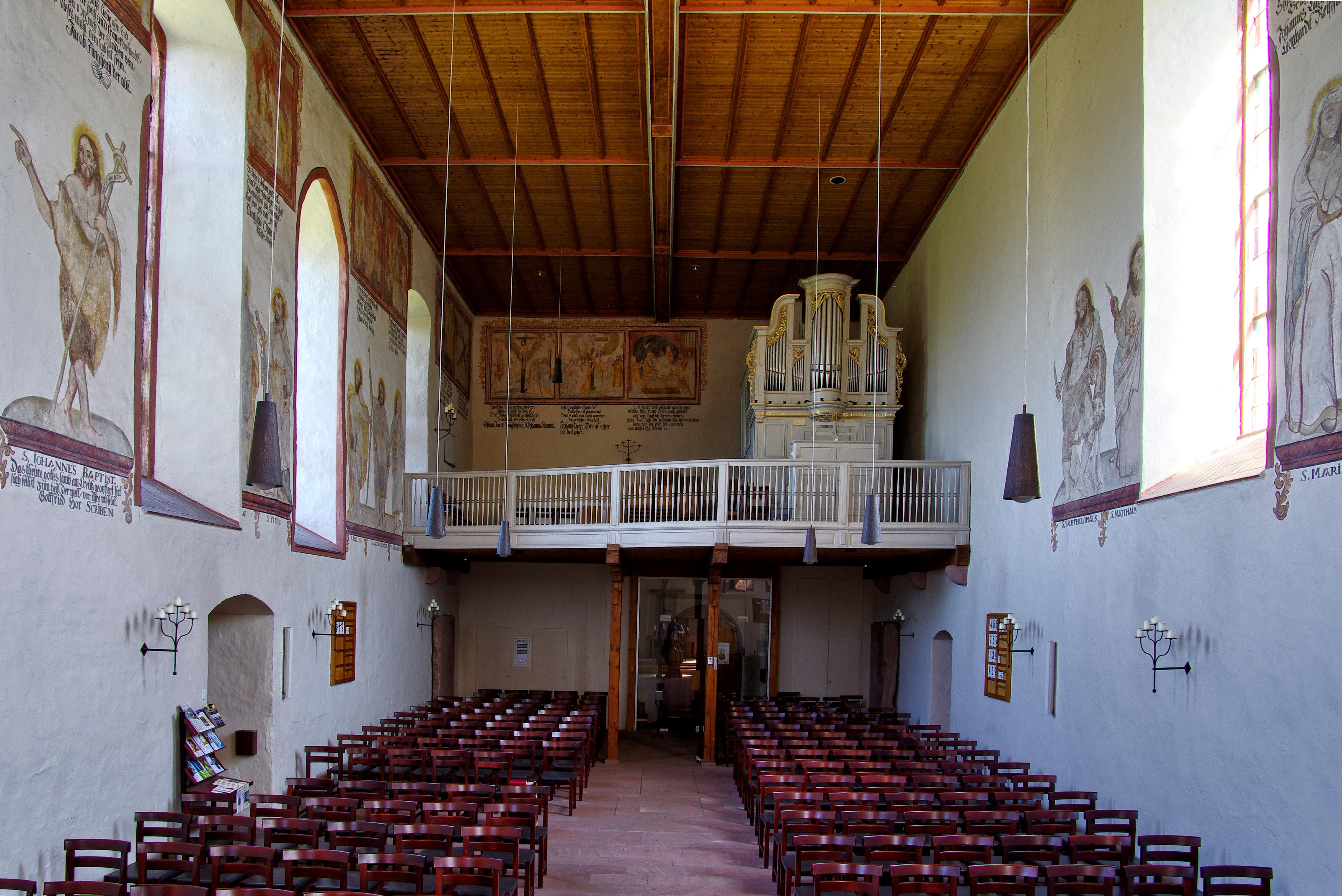 Bergkirche Nimburg, Innenansichten